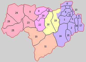 福島県大沼郡の町村。